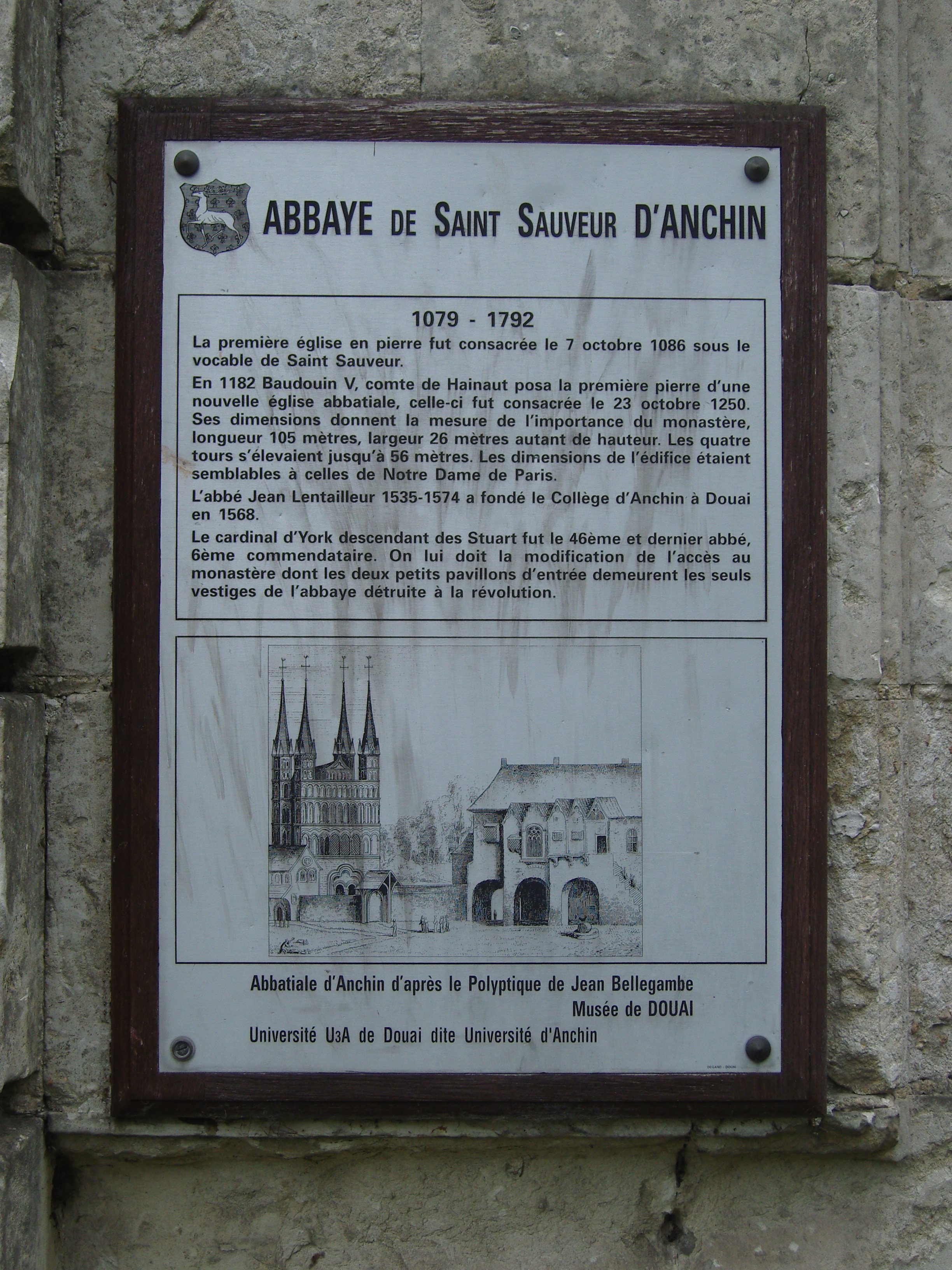 Plan de l'Abbaye d'Anchin en 1792 à Pecquencourt